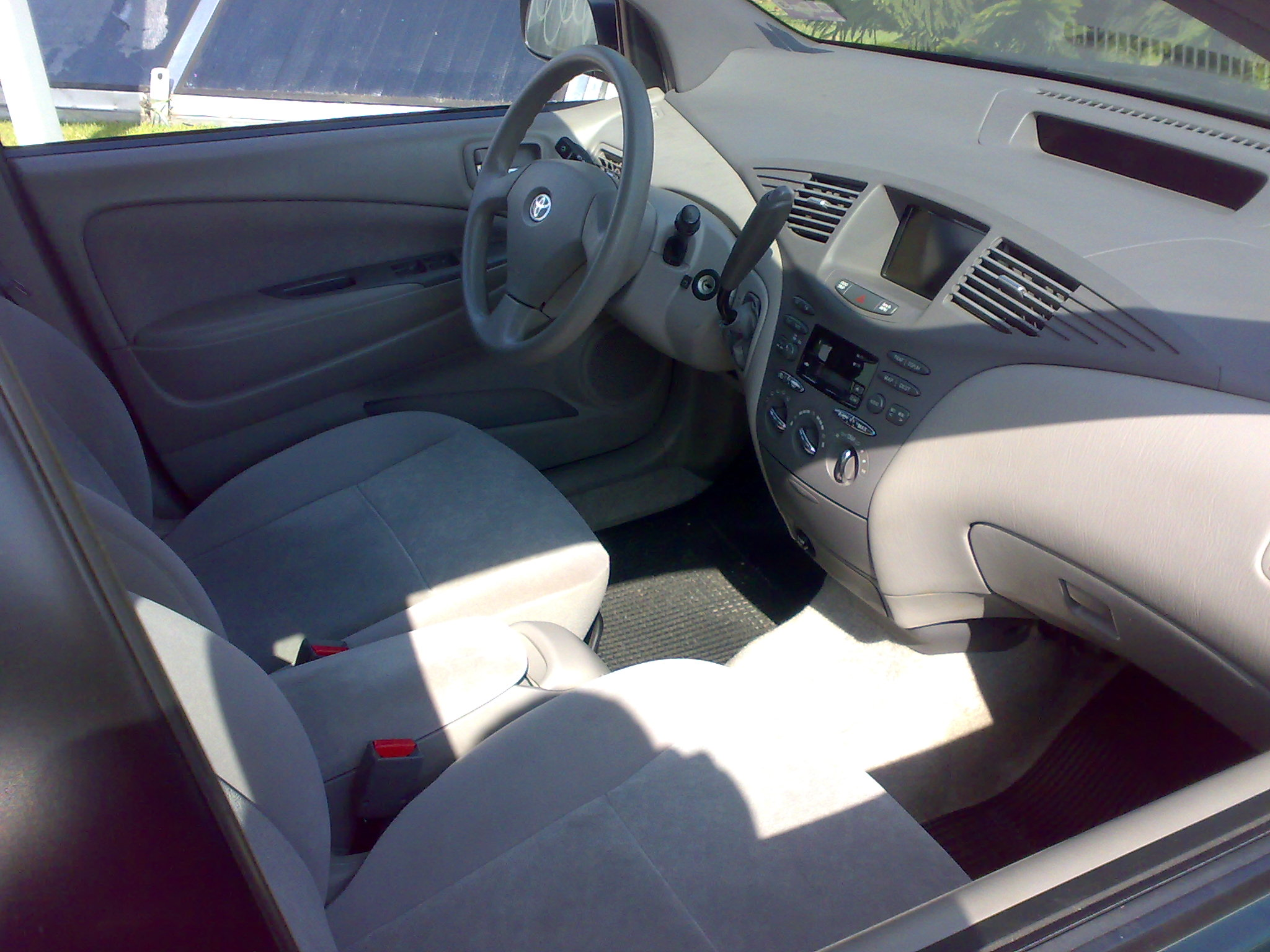 Toyota Prius de primeira geração.